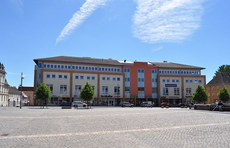 Lilienthalcenter Anklam - Hinterflügel=Gericht